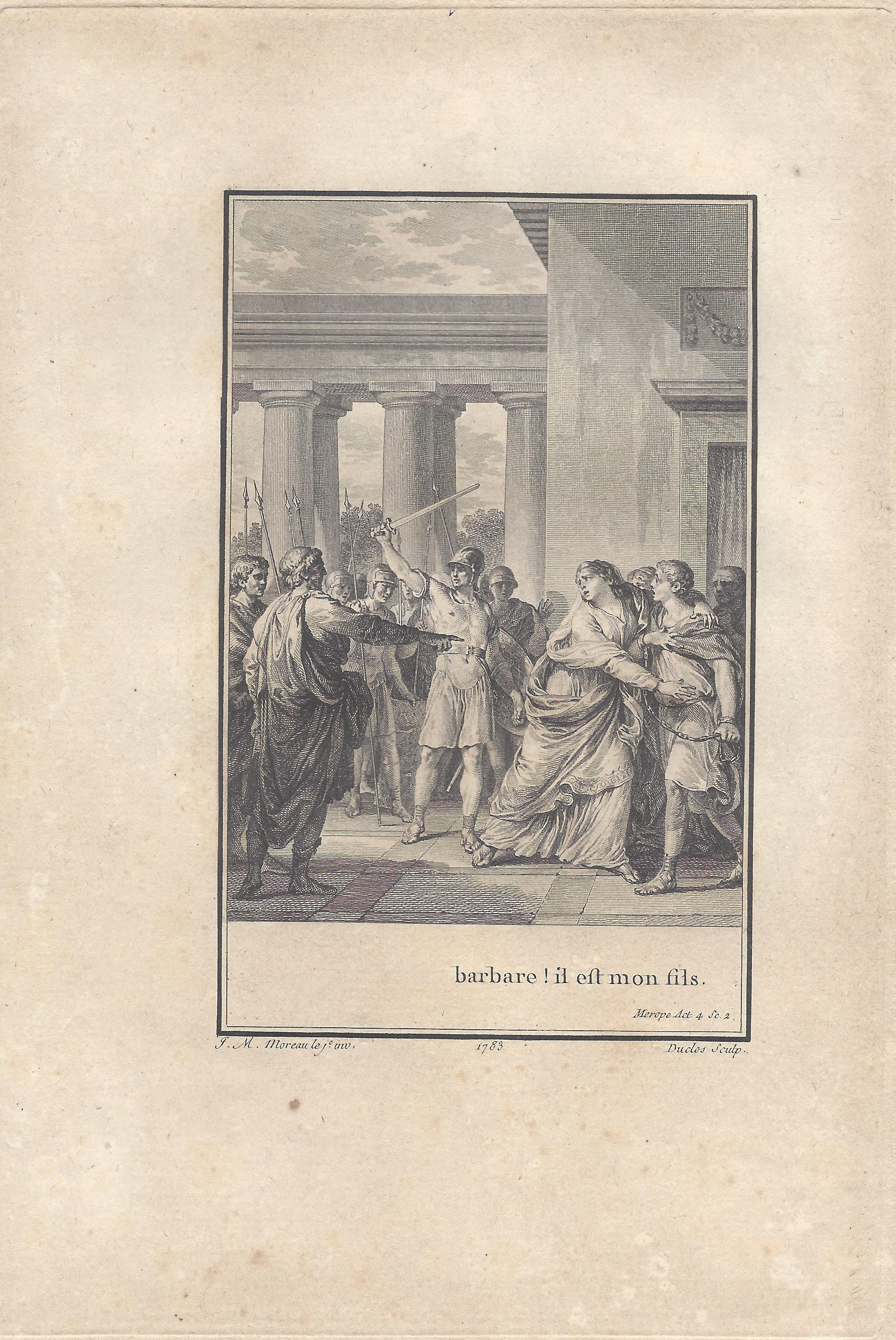 Voltaire: Merope Akt 4 Szene 2 Kupferstich von Antoine-Jean Duclos nach Jean-Michel Moreau